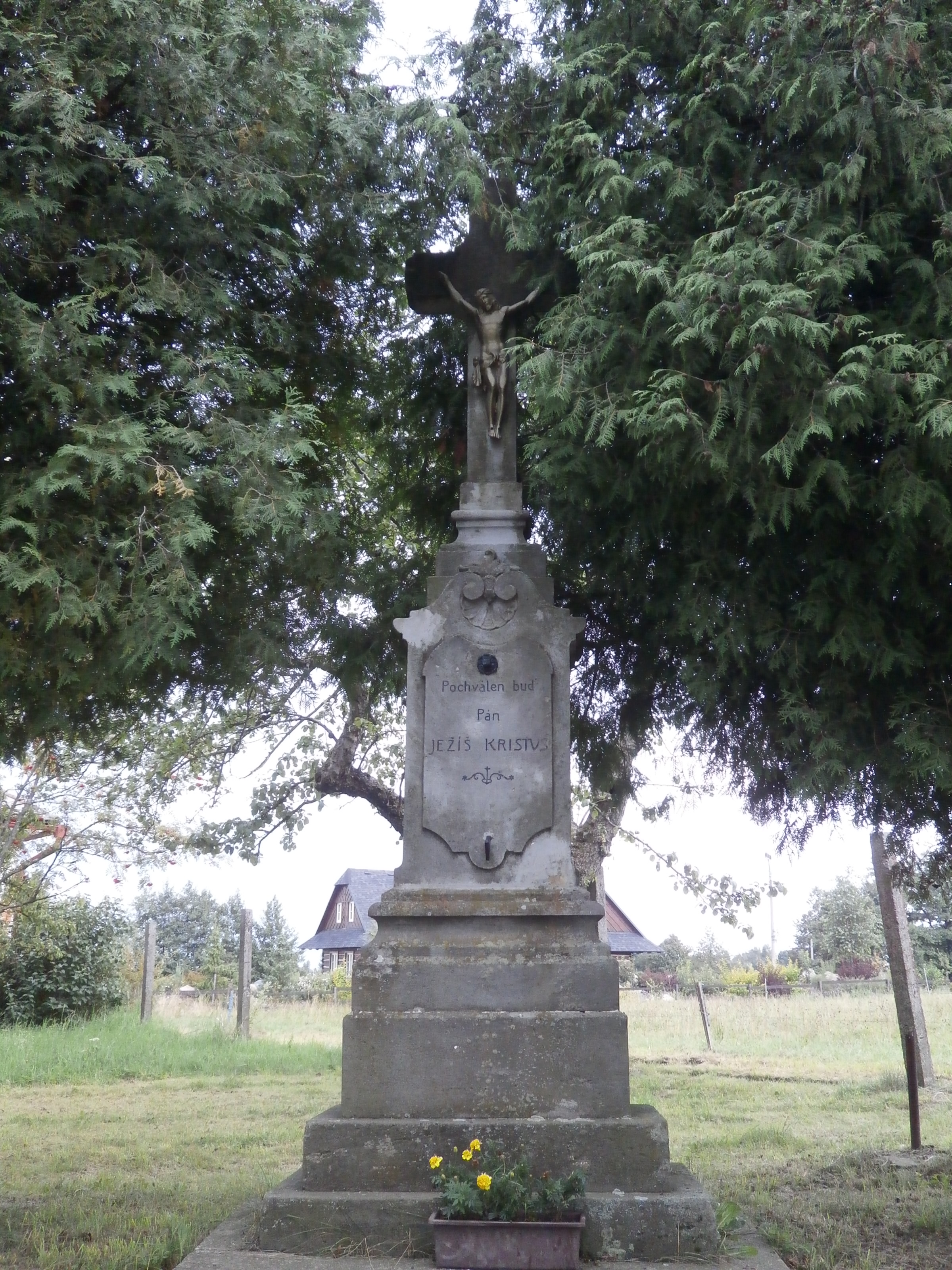 Františky - krucifix